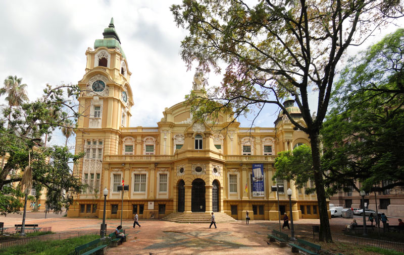 Memorial do Rio Grande do Sul, Porto Alegre, Brasil. Antigamente o prédio dos Correios e Telégrafos, na praça da Alfândega.